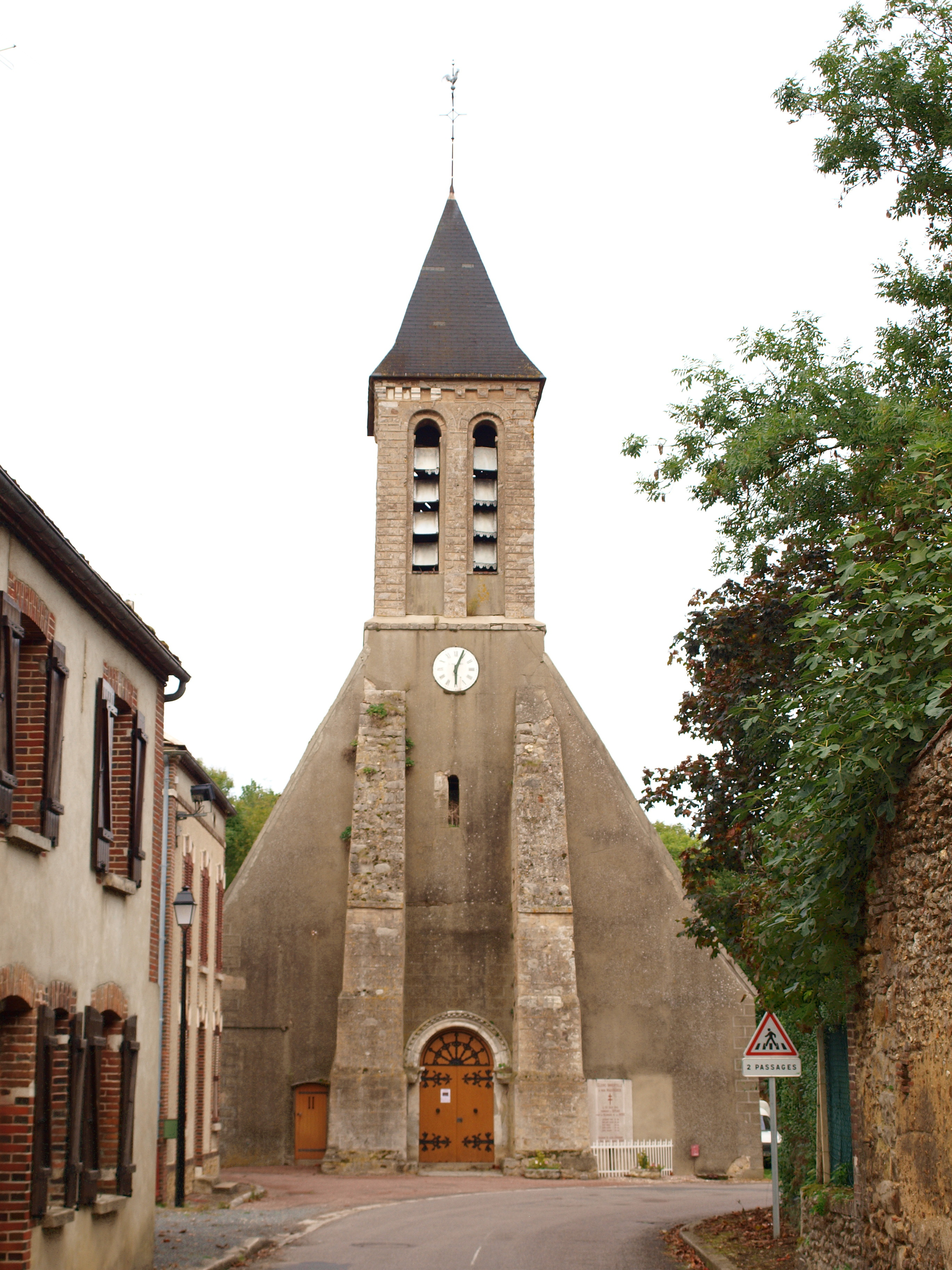 Église Saint-Martin-et-Saint-Marc de Sépeaux (Yonne, France)